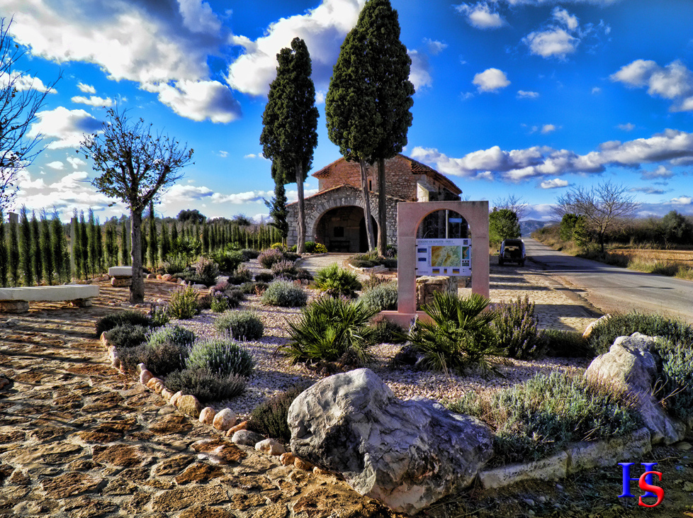 Ermita Santa Barbera